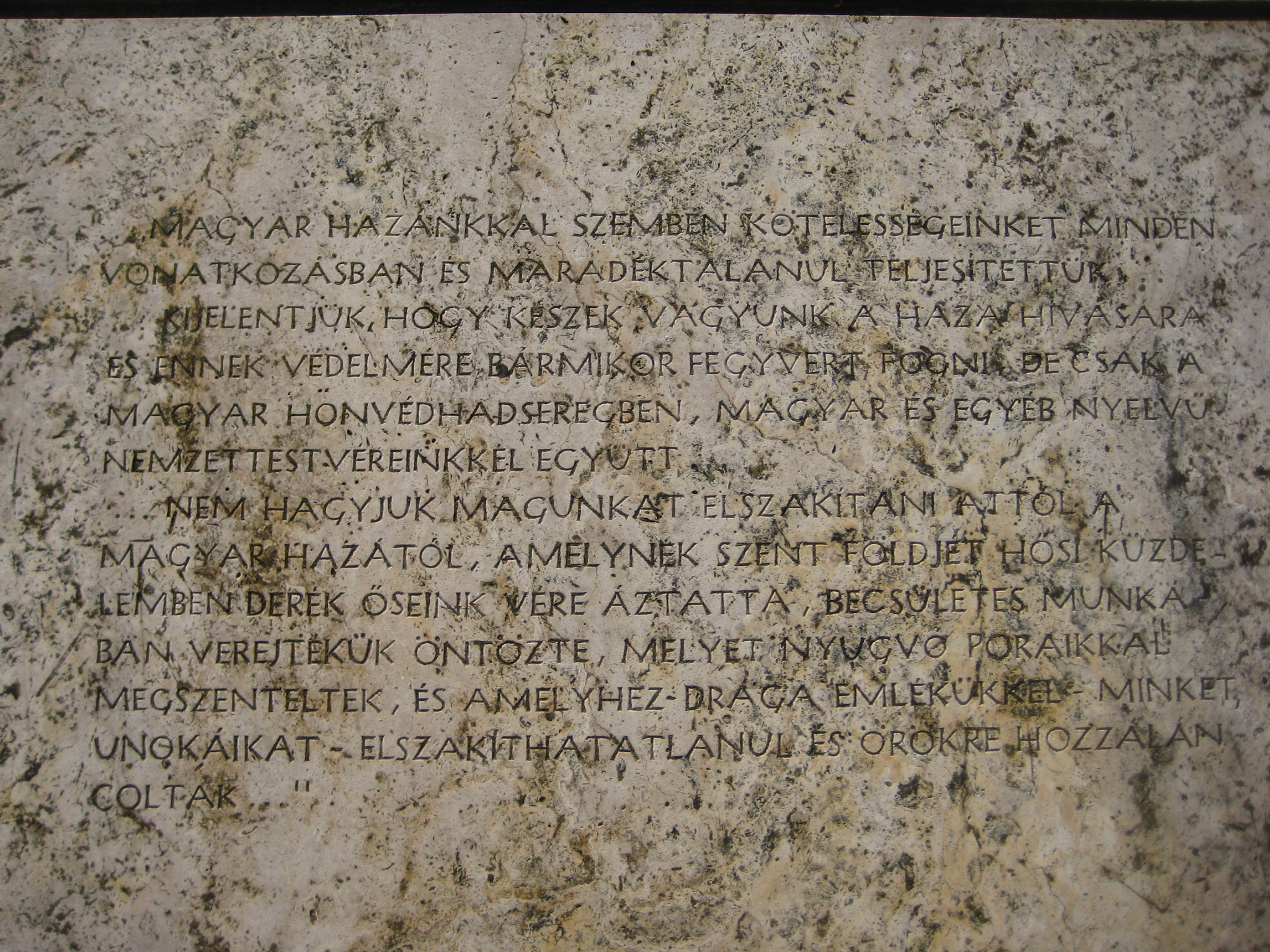 Dorogi Hűségnyilatkozat emlékmű második kép.